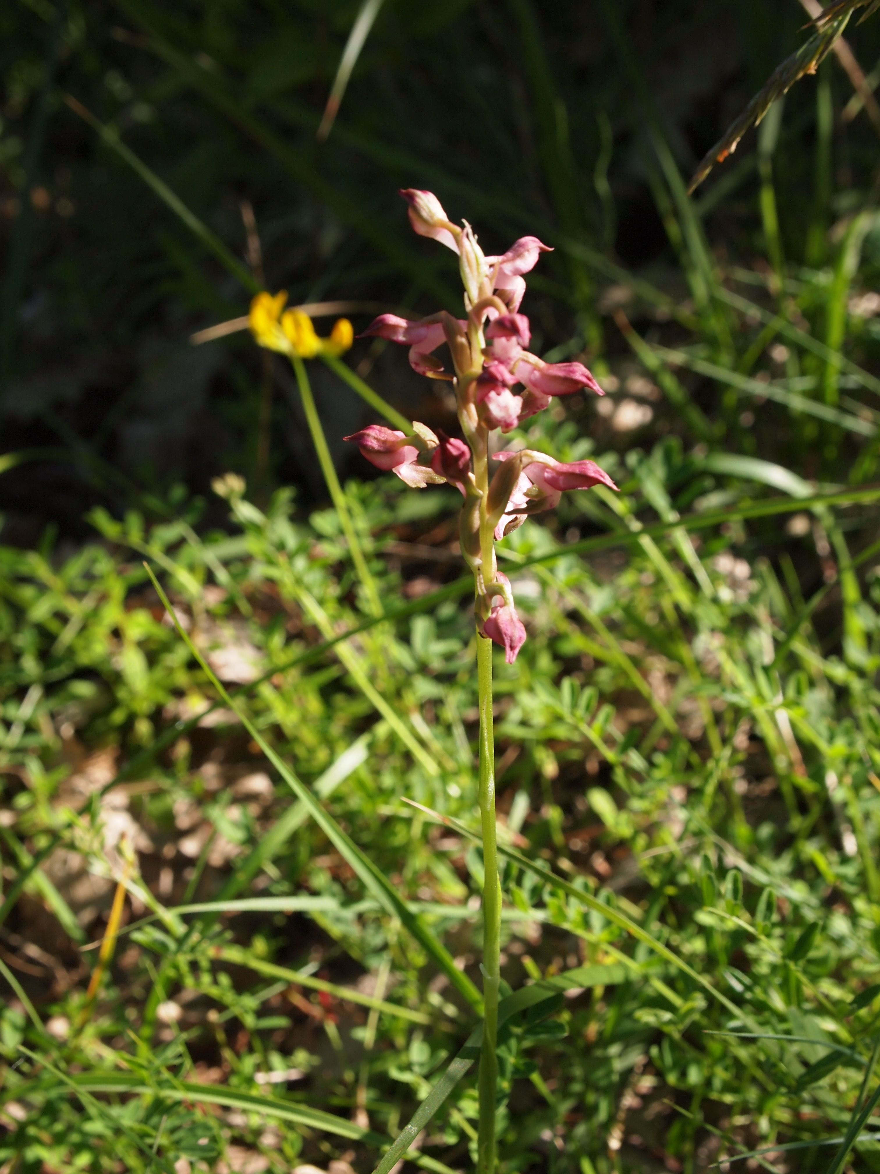 Orchis fragrans, station des Chaudrolles, commune de Saint-Sulpice en Charente, dans le Natura 2000 de la vallée de l'Antennne